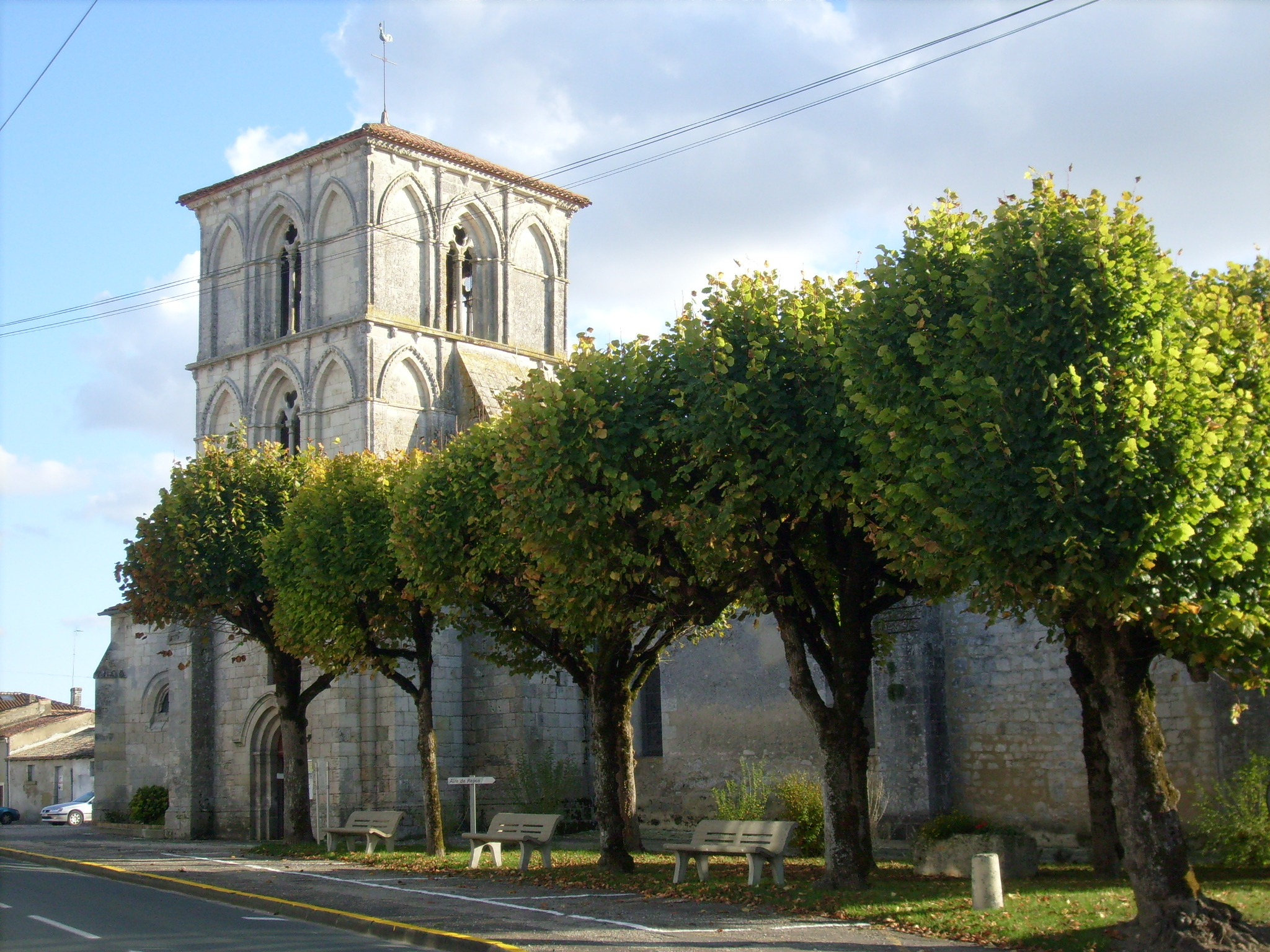 Eglise de Saint-Ciers du Taillon